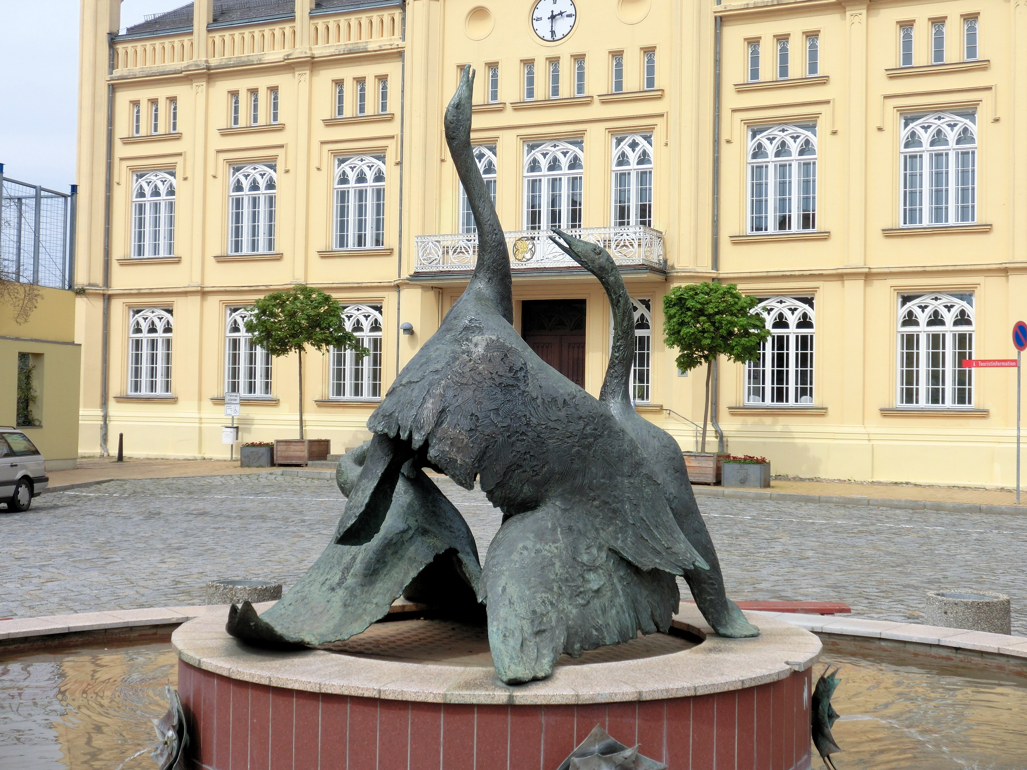 Bützow, Gänsebrunnen von Walther Preik aus Waren/Müritz (1981), Rathaus